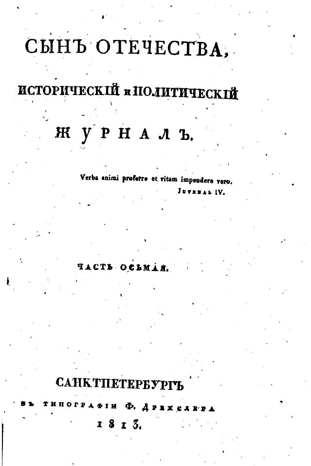 Титульный лист журнала «Сын отечества»